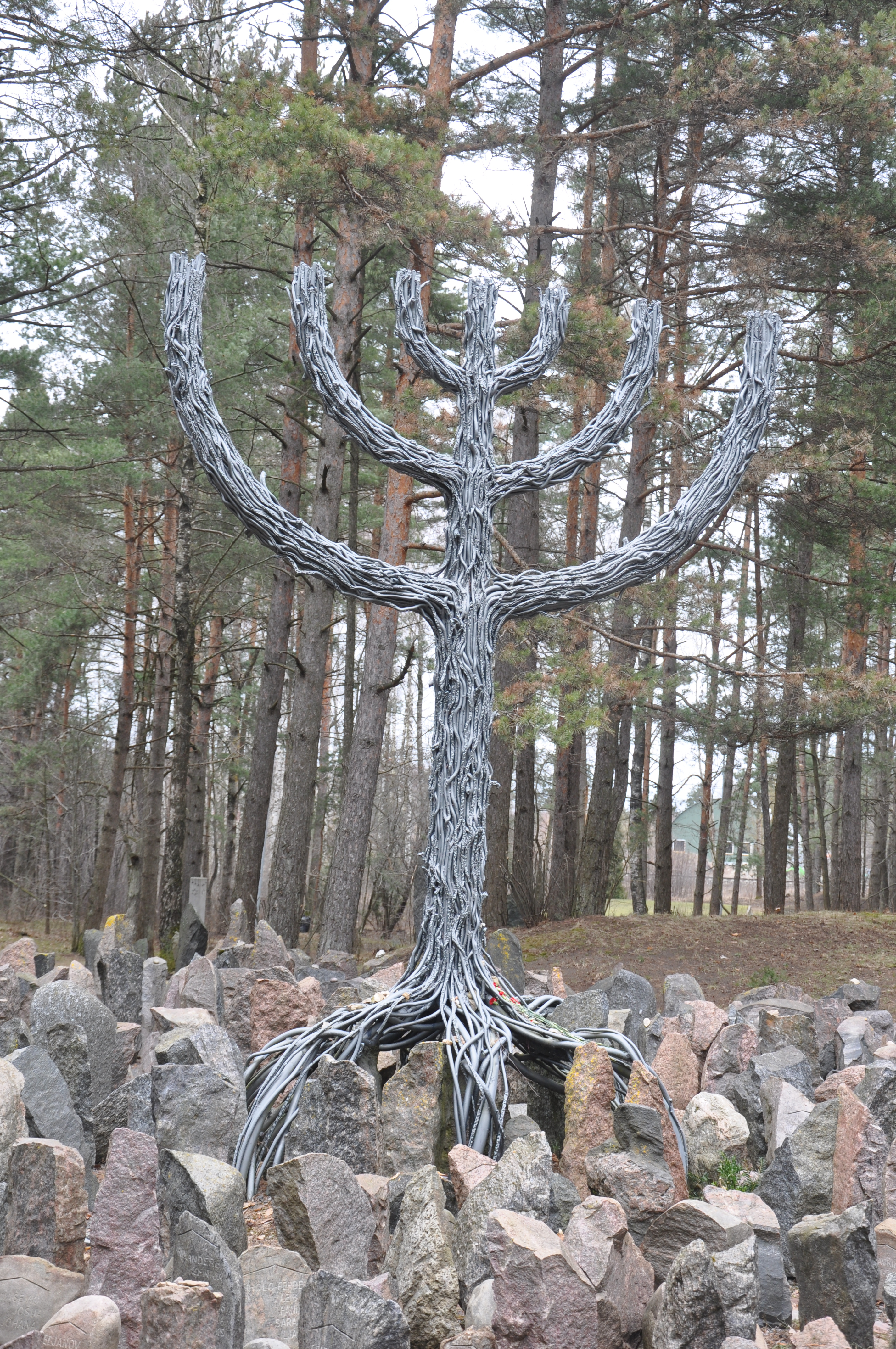 Ebreju masu kapa vieta Rumbulas mežā (vairāk kā 26000 cilvēku) WW2, Rumbula, Rīga, Latvia